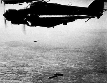 Savoia Marchetti SM.79 111 stormo in bombardamento in Spagna